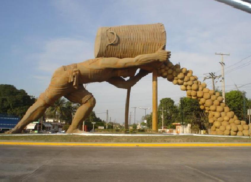 foto tomada al monumento de Alamo Ver. foto tomada por mi hermano.